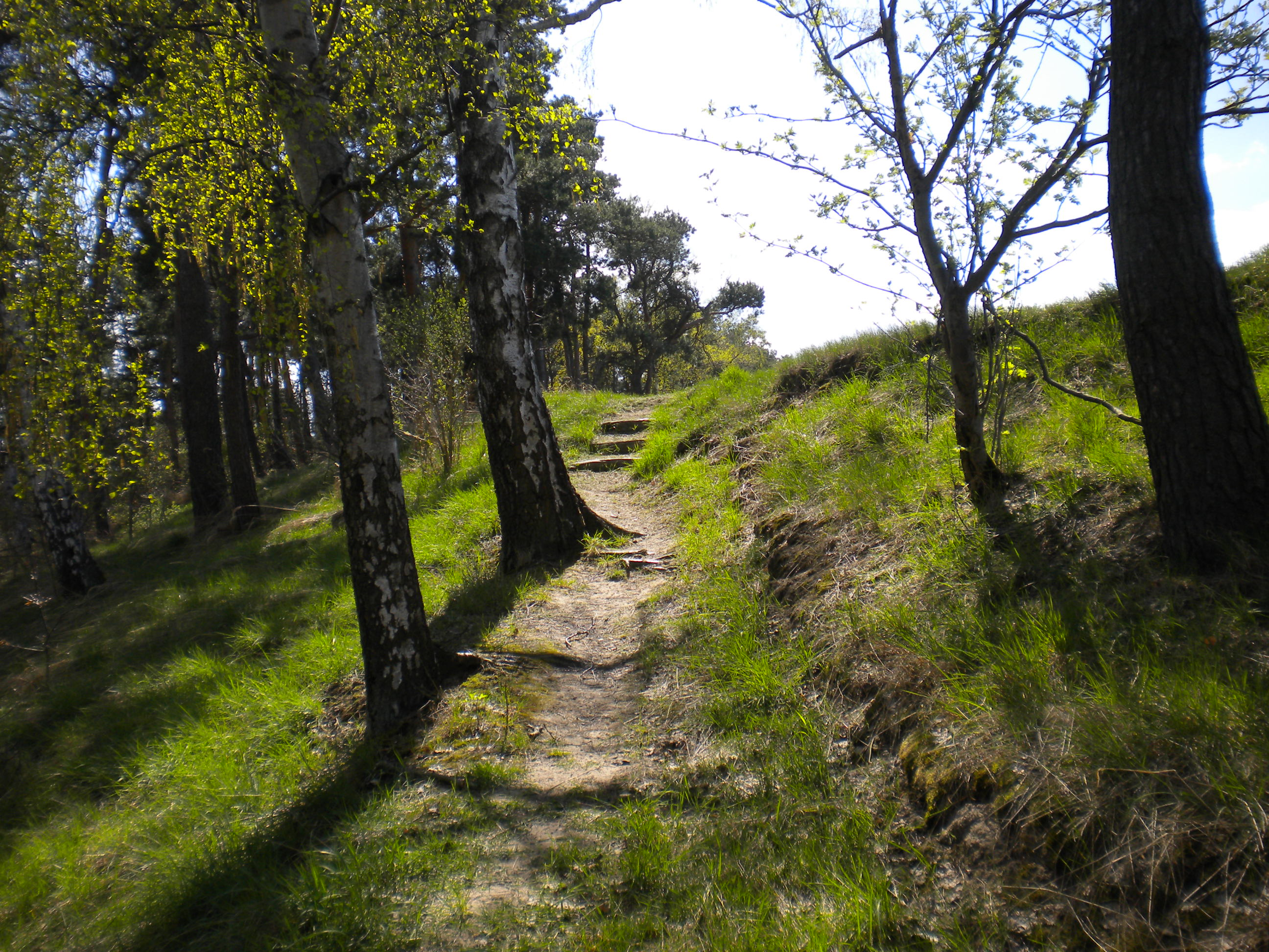 Höchste Erhebung der Umgebung; Grab- und Kultplatz aus der Mittelsteinzeit